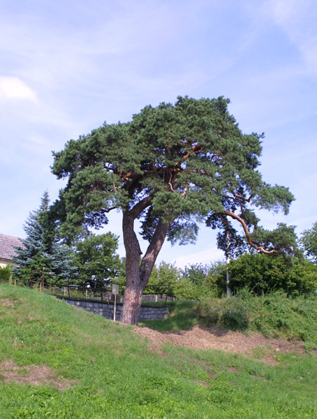 Památný strom Borovice v Kamenném Újezdě od jihovýchodu.